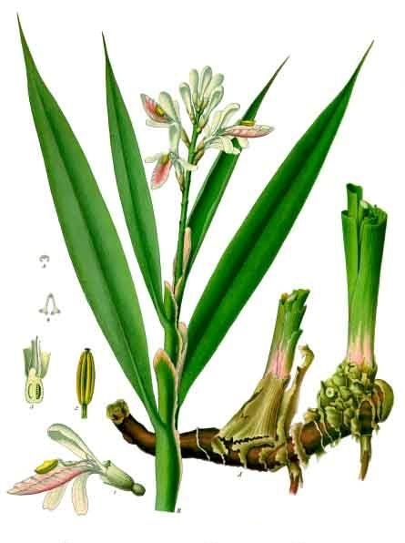 Echter Galgant. A B Theile der Pflanze in natürl. Grösse; 1 Blüthe, vergrössert; 2 oberer Theil des Staubgefässes mit durchlaufendem Griffel, desgl.; 3 Querschnitt des Filaments mit Griffel, desgl.; 4 Antherenquerschnitt mit Connectiv und Griffel, desgl.; 5 Fruchtknoten im Längsschnitt mit dem einen drüsenartigen, unfruchtbaren Staubgefäss, desgl.